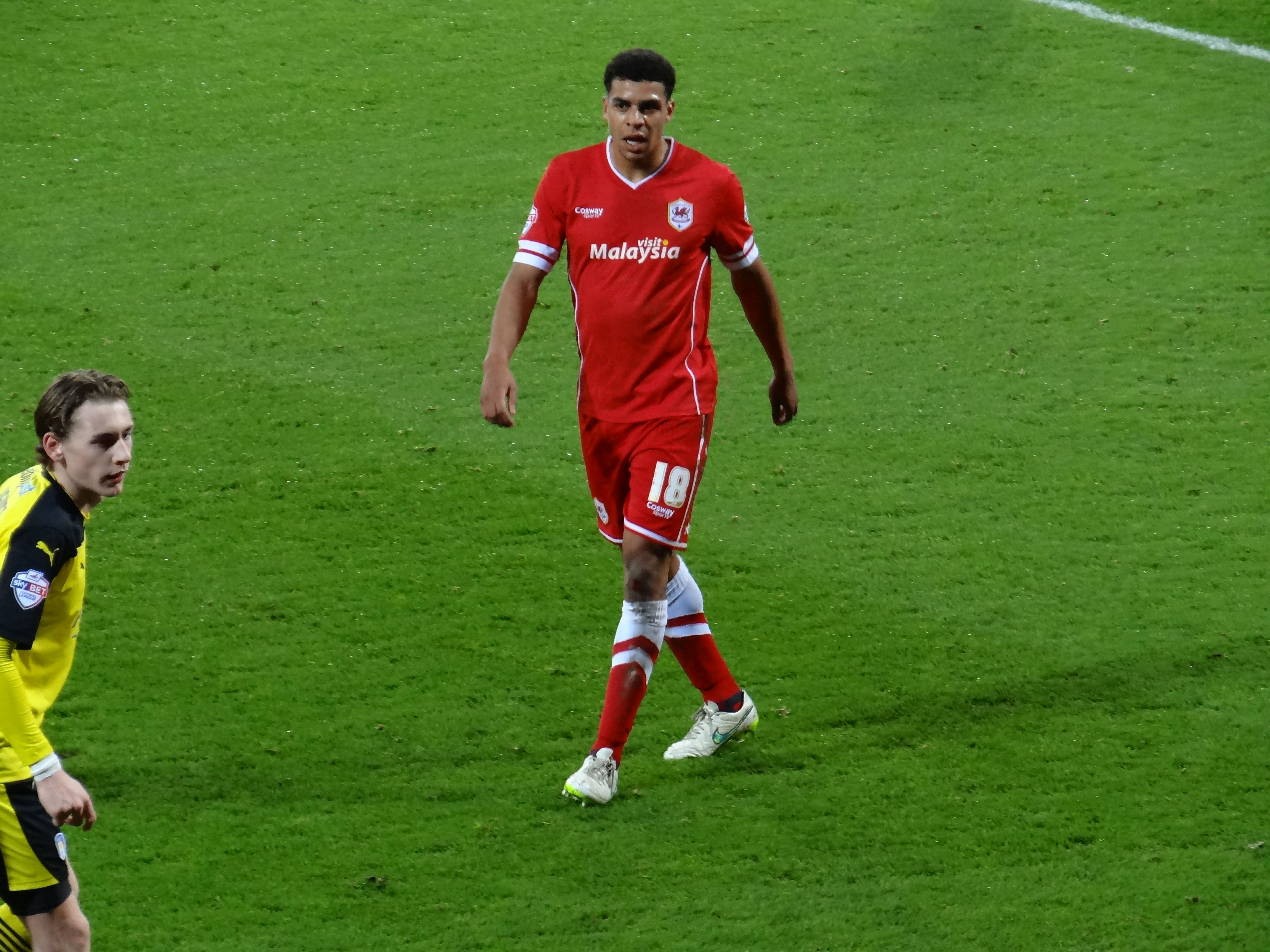 Tom Adeyemi